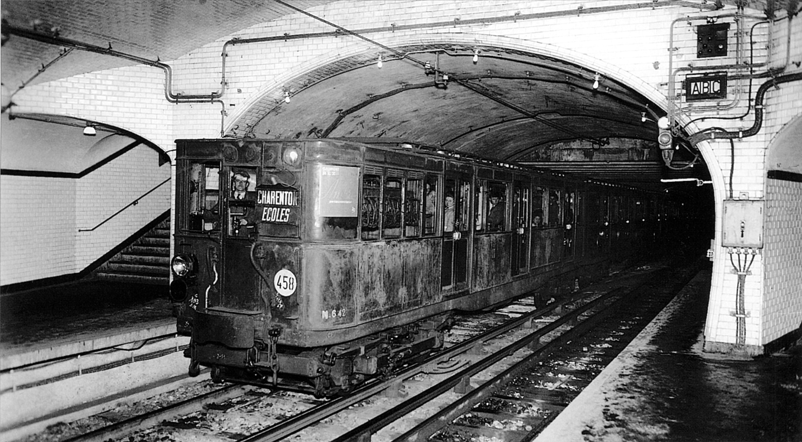 Une rame de la ligne 8 du métro de Paris, France, en direction de la station Charenton - Ecoles.